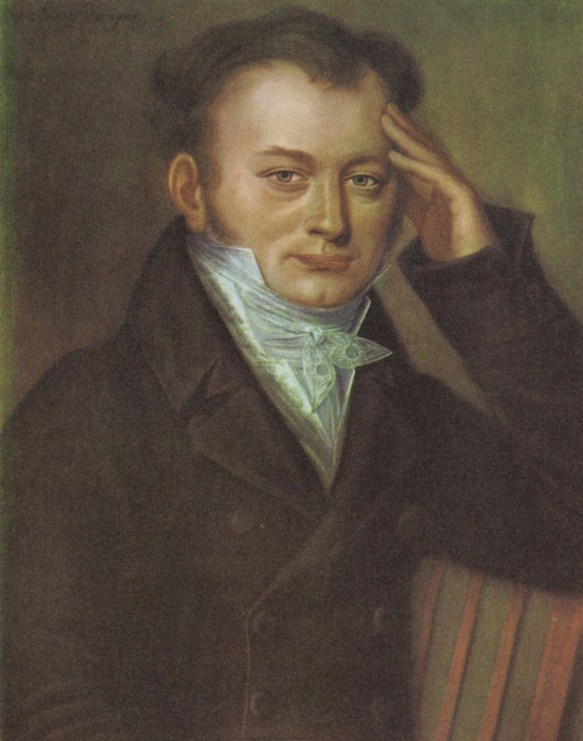 Heinrich August Matthäi, Konzertmeister des Gewandhausorchesters 1817–1835 (Pastellbild eines unbekannten Malers)